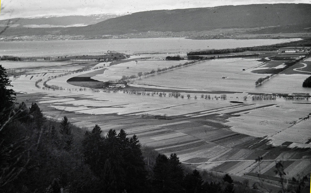 Das Grosse Moos überschwemmt. Gampelen